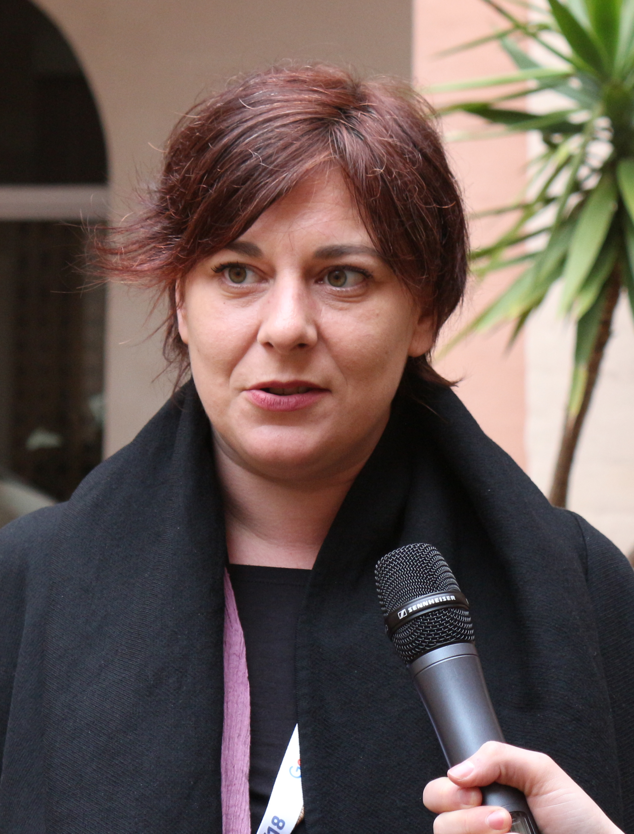 Cecilia Strada, filantropa e scrittrice italiana